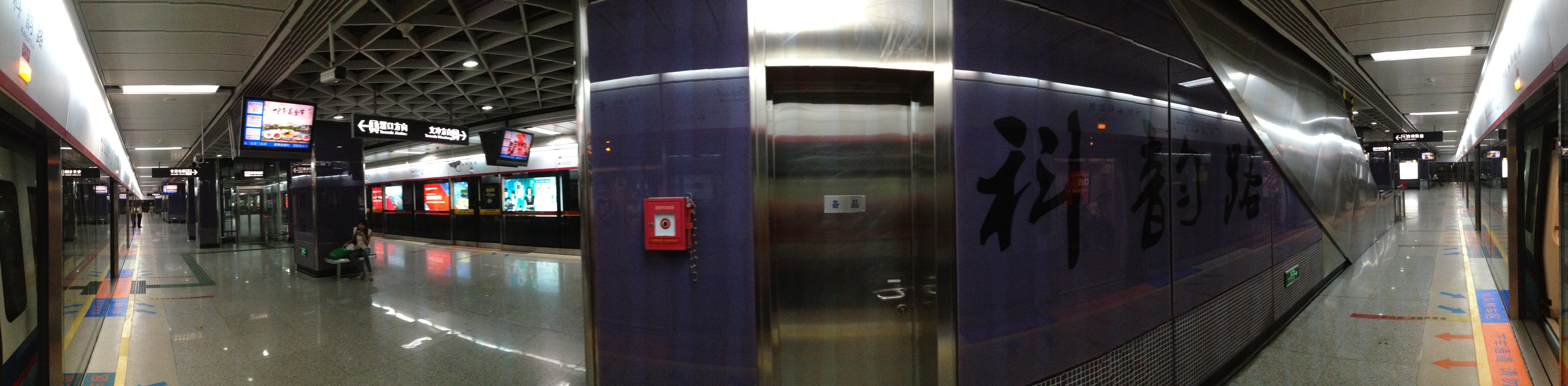 广州地铁科韵路站月台全景图